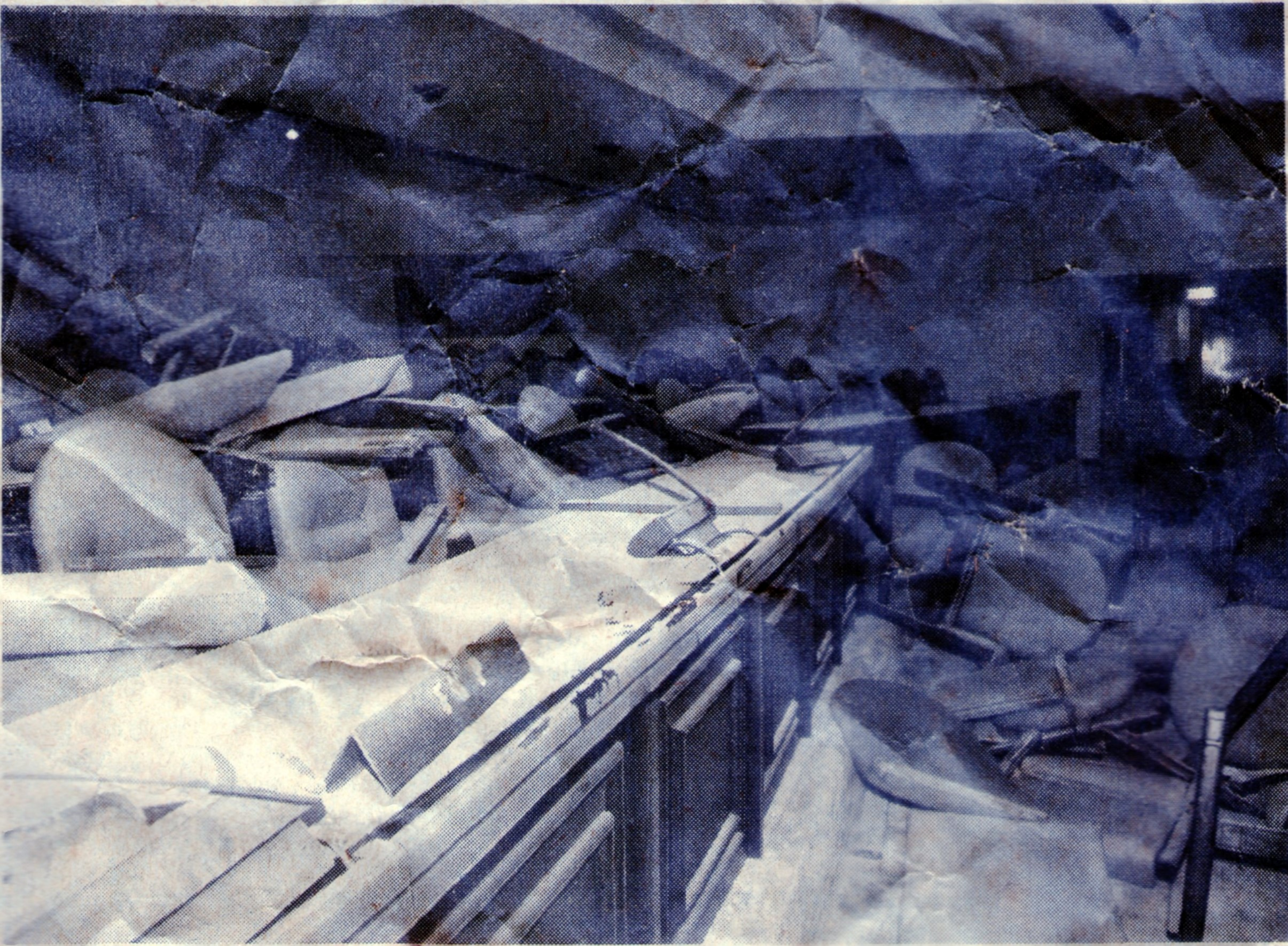 Ruang sidang utama gedung DPR hancur berantakan setelah ditinggalkan massa mahasiswa yang menguasai gedung DPR selama kurang lebih seminggu.